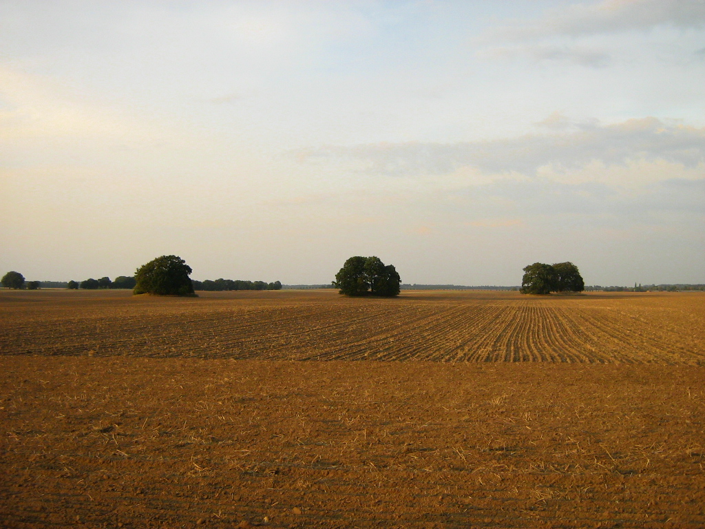 Vier Großsteingräber in der Feldmark der Gemeinde Gnewitz, (Landkreis Bad Doberan, Mecklenburg) - von links nach rechts „Gnewitz 1“ bis „4“ bzw. nach Sprockhoff Nr. 350 bis 352 (Nr 4 ist hier vielleicht nicht benummert?) [1] Gnewitz 1 Object location54° 04′ 25.39″ N, 12° 31′ 31.73″ E Gnewitz 2 Object location54° 04′ 25.08″ N, 12° 31′ 37.39″ E Gnewitz 3 Object location54° 04′ 25.17″ N, 12° 31′ 44.58″ E Gnewitz 4 Object location54° 04′ 25.23″ N, 12° 31′ 46.11″ E validation ↑